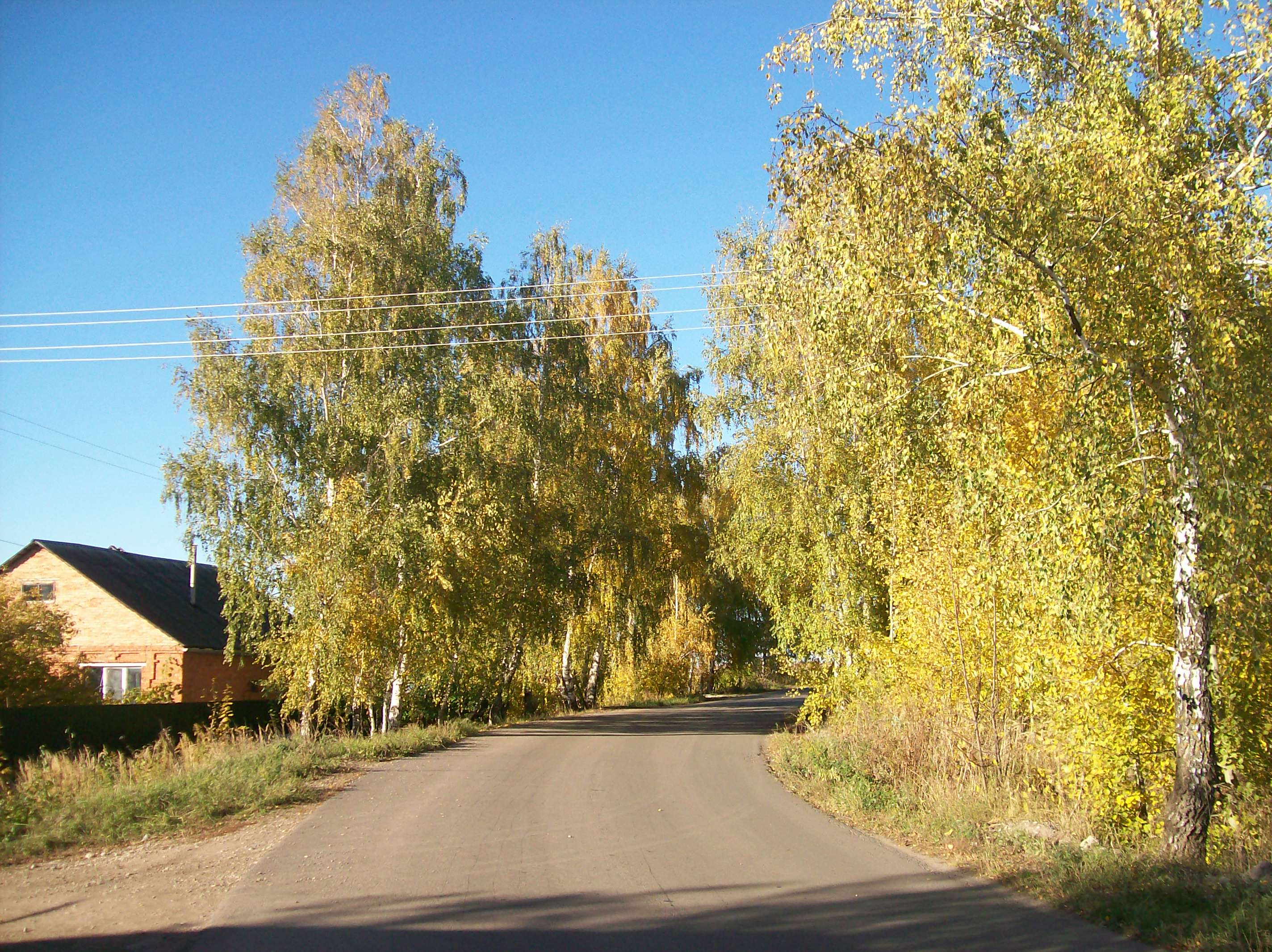 Болохово. Дорога на Новое Село